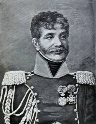 Le colonel baron Ferdynand Ignacy Stokowski. Chef d'escadron des chevau-légers polonais de la Garde impériale en 1807, il devient colonel du 7e régiment de chevau-légers lanciers (ancien 1er régiment des lanciers de la Vistule).